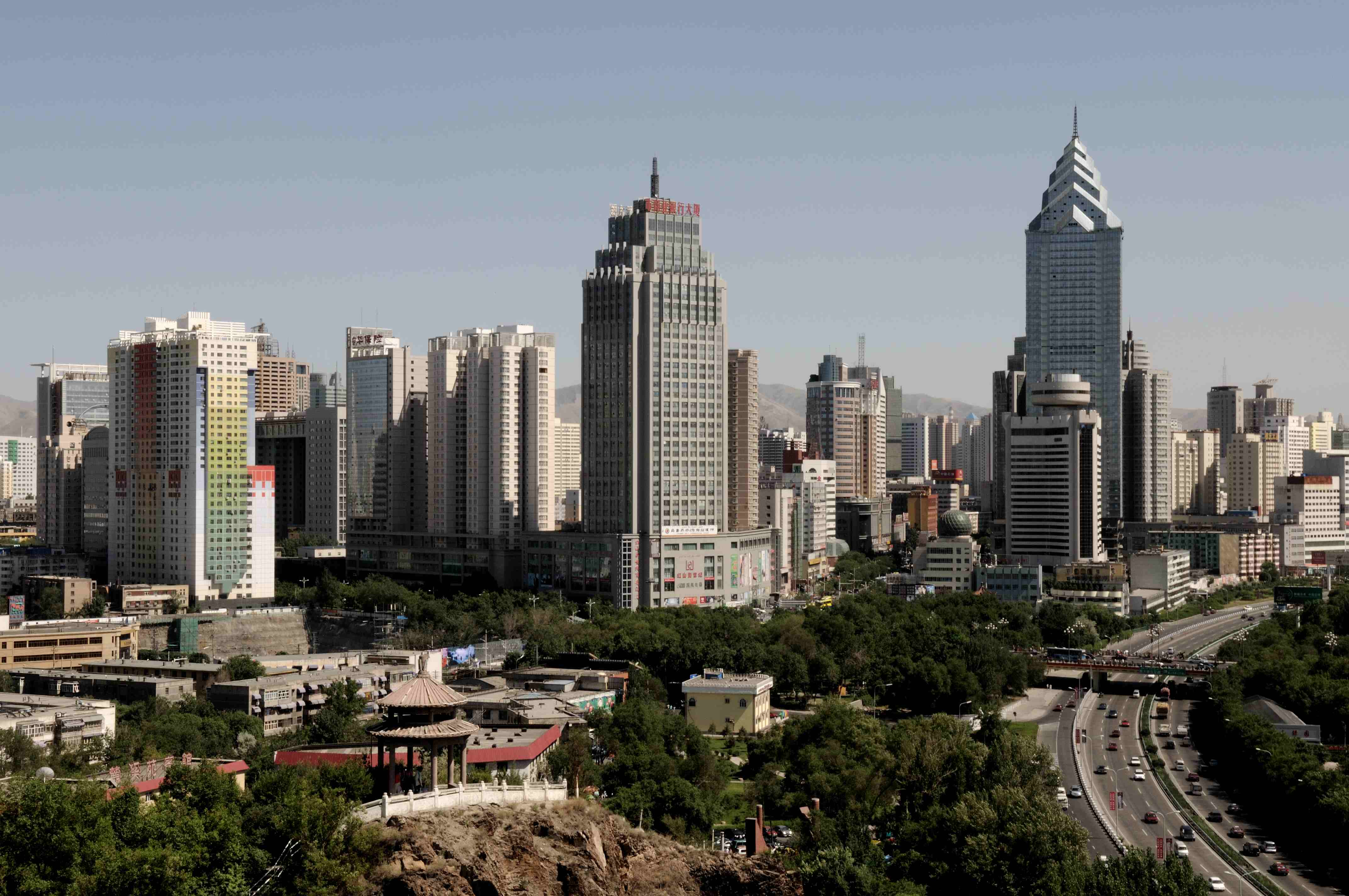 Urumqi